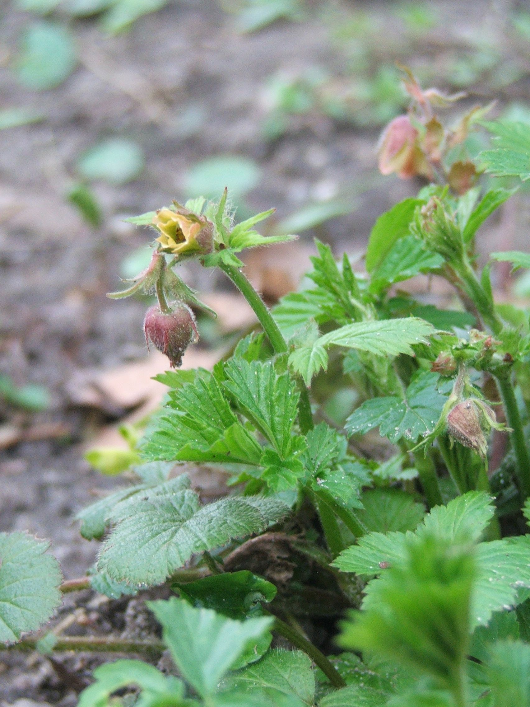 Geum glaciale MTA Botanic Garden Vácrátót, Hungary